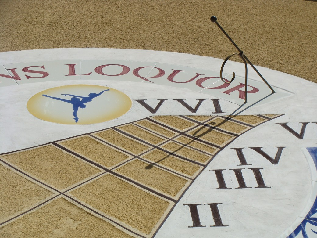 Cadran solaire mural (vertical, déclinant), placette Ernest Rougon, à Espinasses, détail.